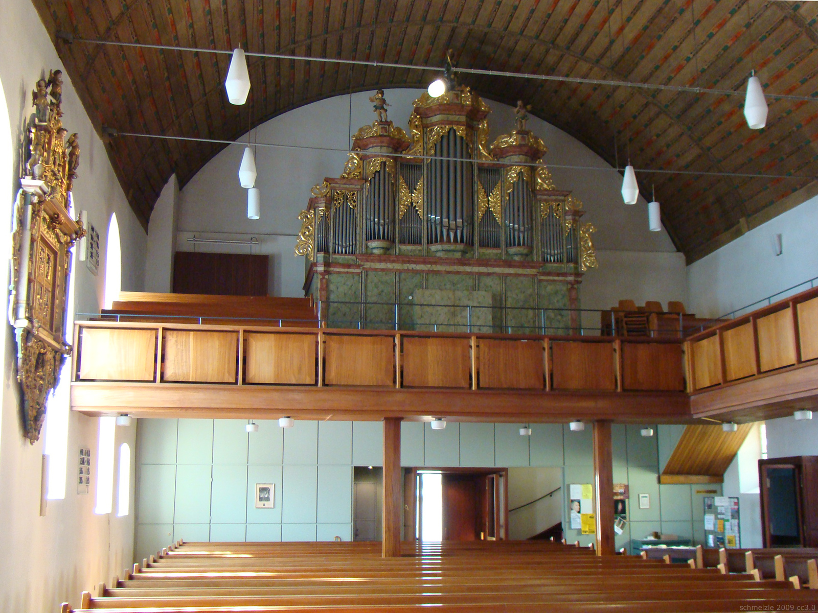 Detail aus der Stadtkirche St. Jakobus in Brackenheim